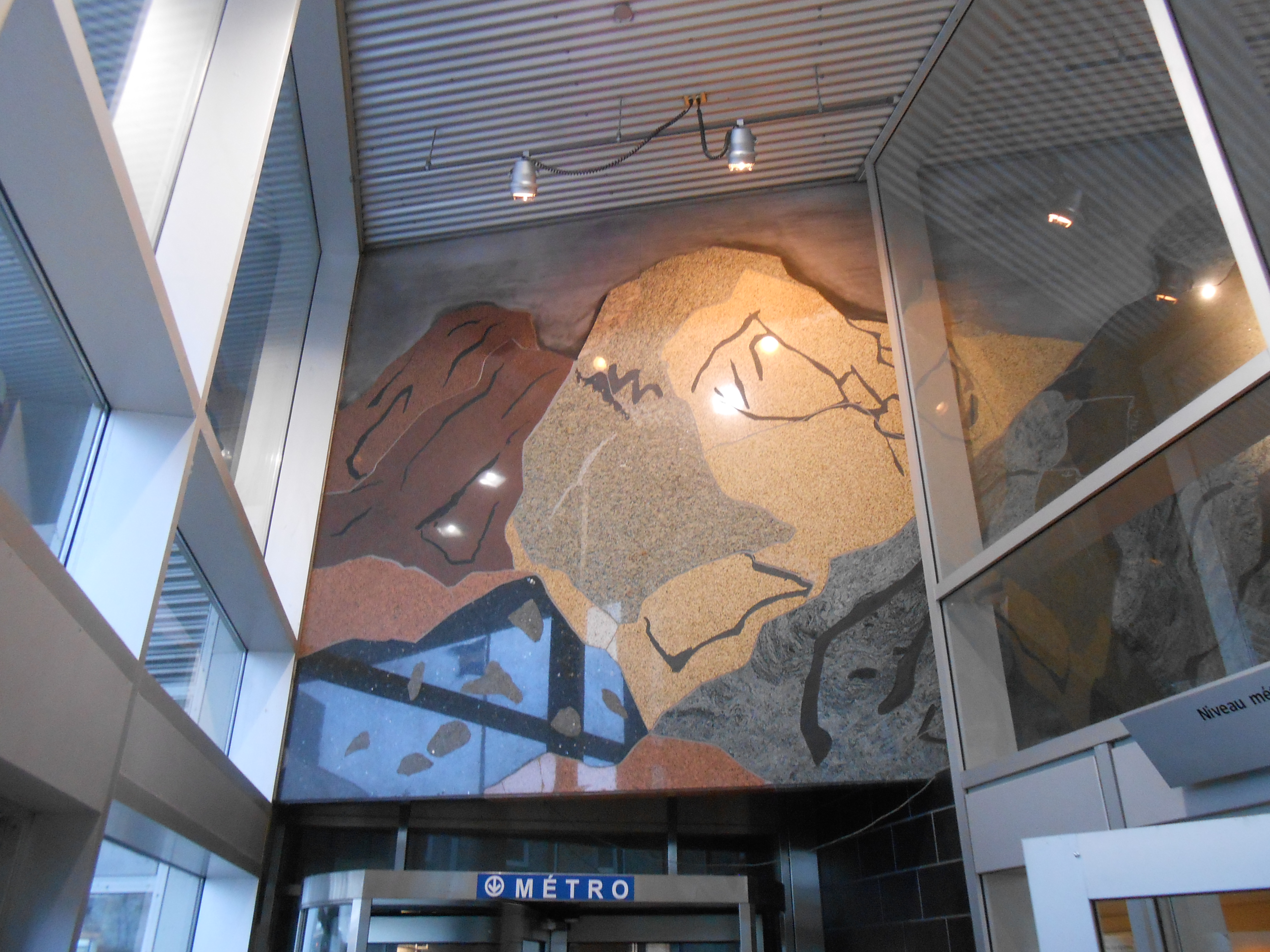 Montagnes, bas-relief de Françoise Sullivan, pavillon Président-Kennedy, complexe des sciences de l'Université du Québec à Montréal